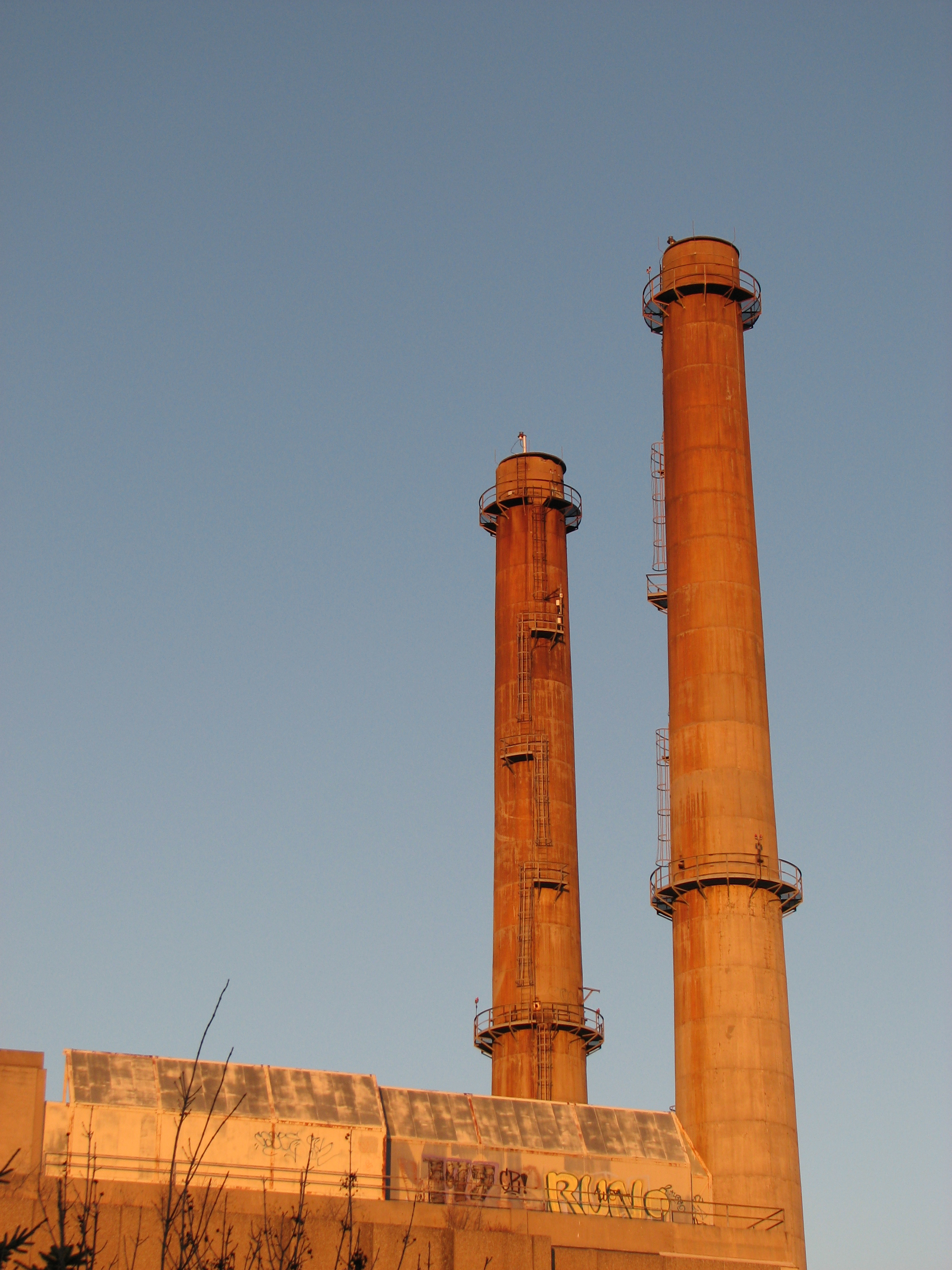 Les deux cheminées (75 m) de l'ancien incinérateur des Carrières à Montréal